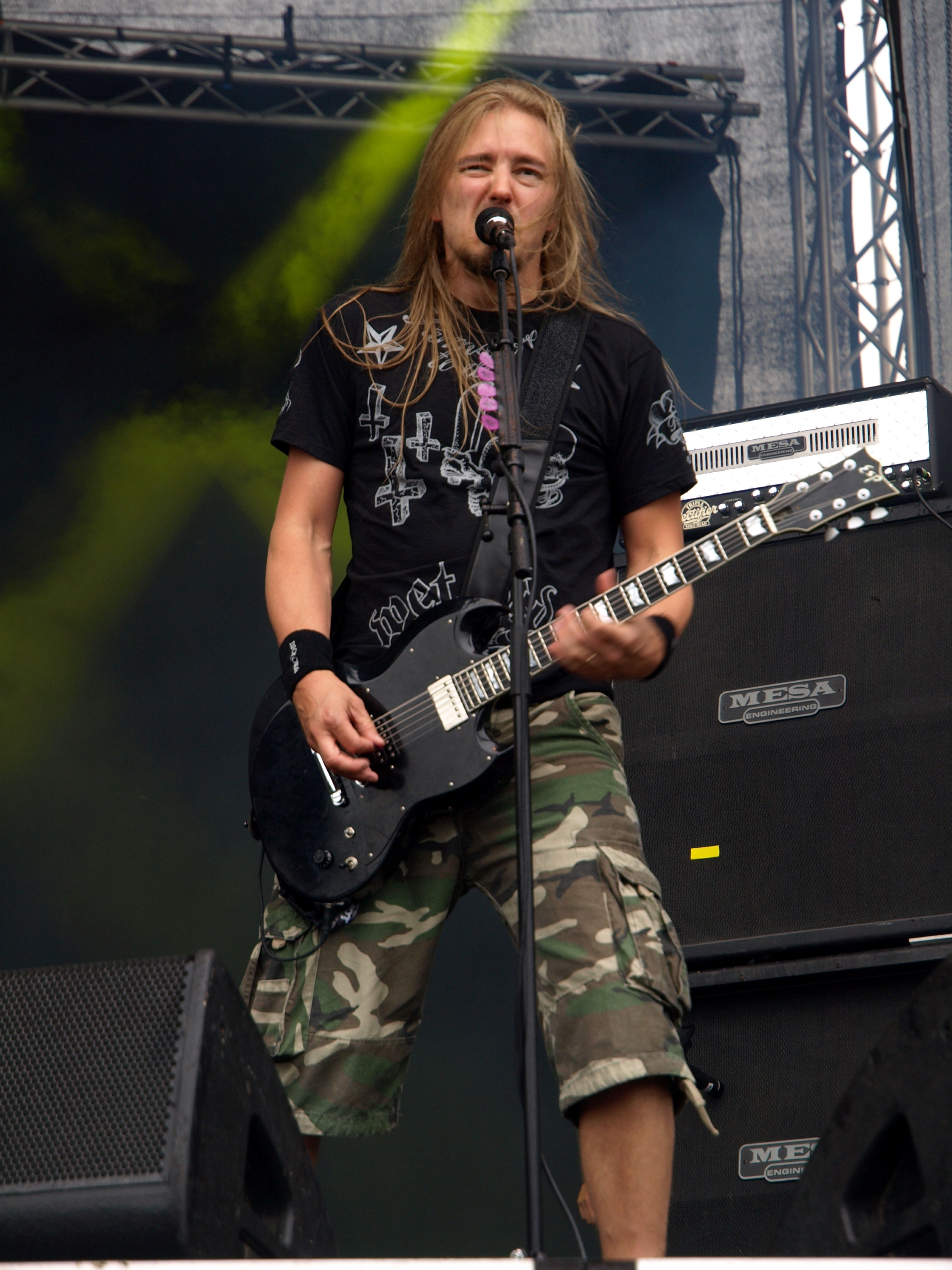 Mokoma live am Myötätuulirock 2011